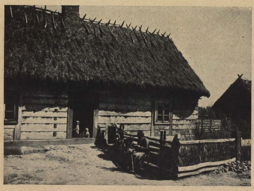 Materiały z wystawy Architektury Polskiej, urządzonej w 1915 r. staraniem Koła Architektów i Towarzystwa Opieki nad Zabytkami Przeszłości w Warszawie.